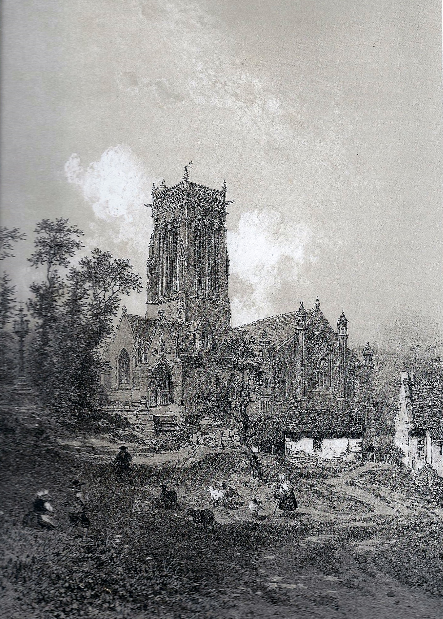 "Église de Saint-Herbot près du Huelgoat" (dessin d'Eugène Cicéri, publié dans Félix Benoist, "La Bretagne contemporaine", tome "Finistère", 1867).